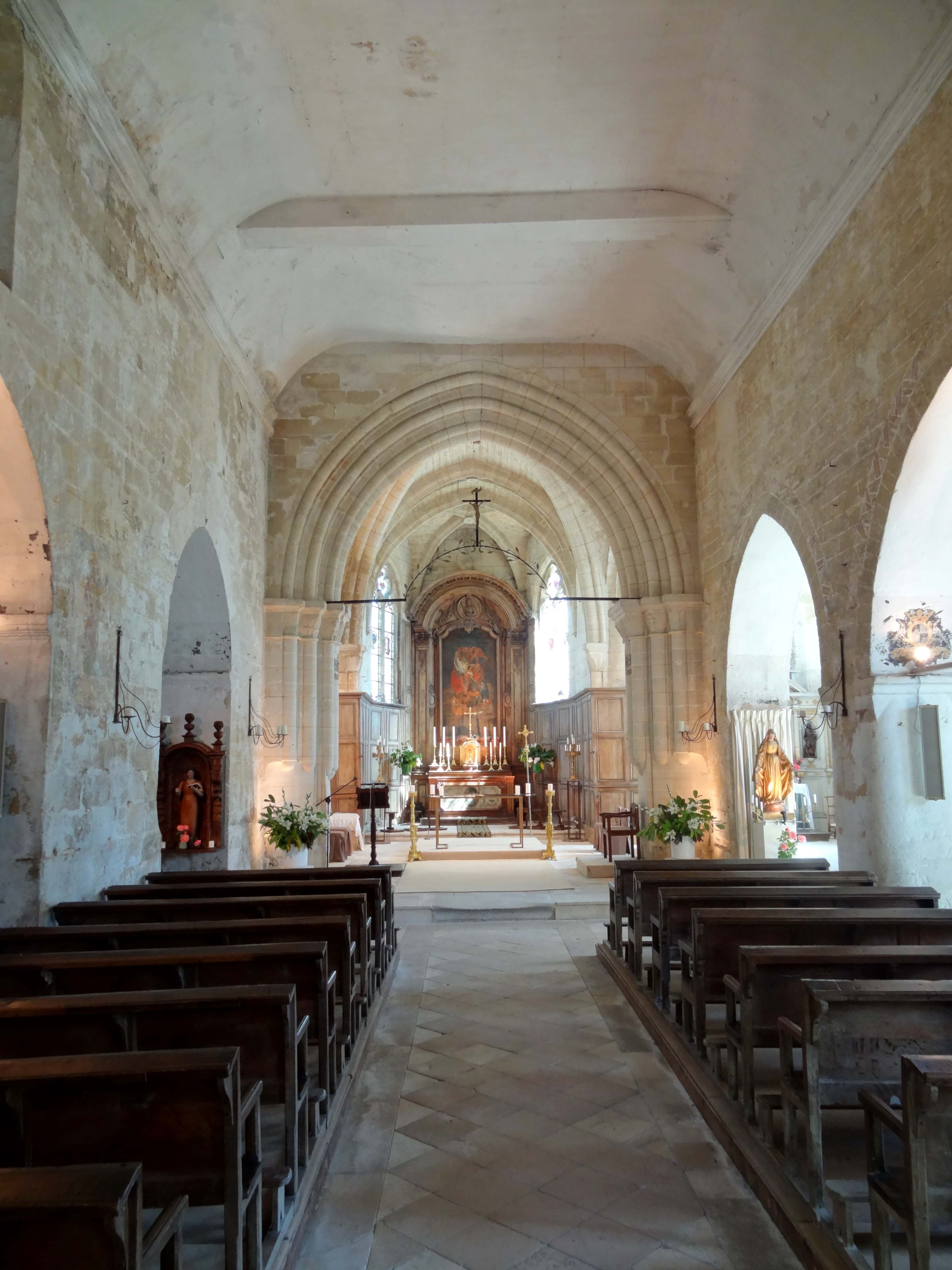 Intérieur de l'église - voir titre.